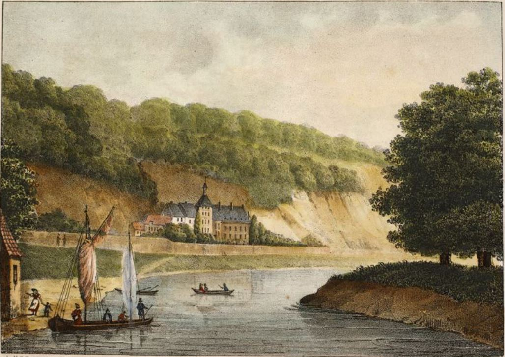 55. Abbaye de Flône sur la Meuse.